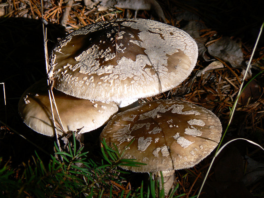 Amanita excelsa (Fr. : Fr.) Bertillon